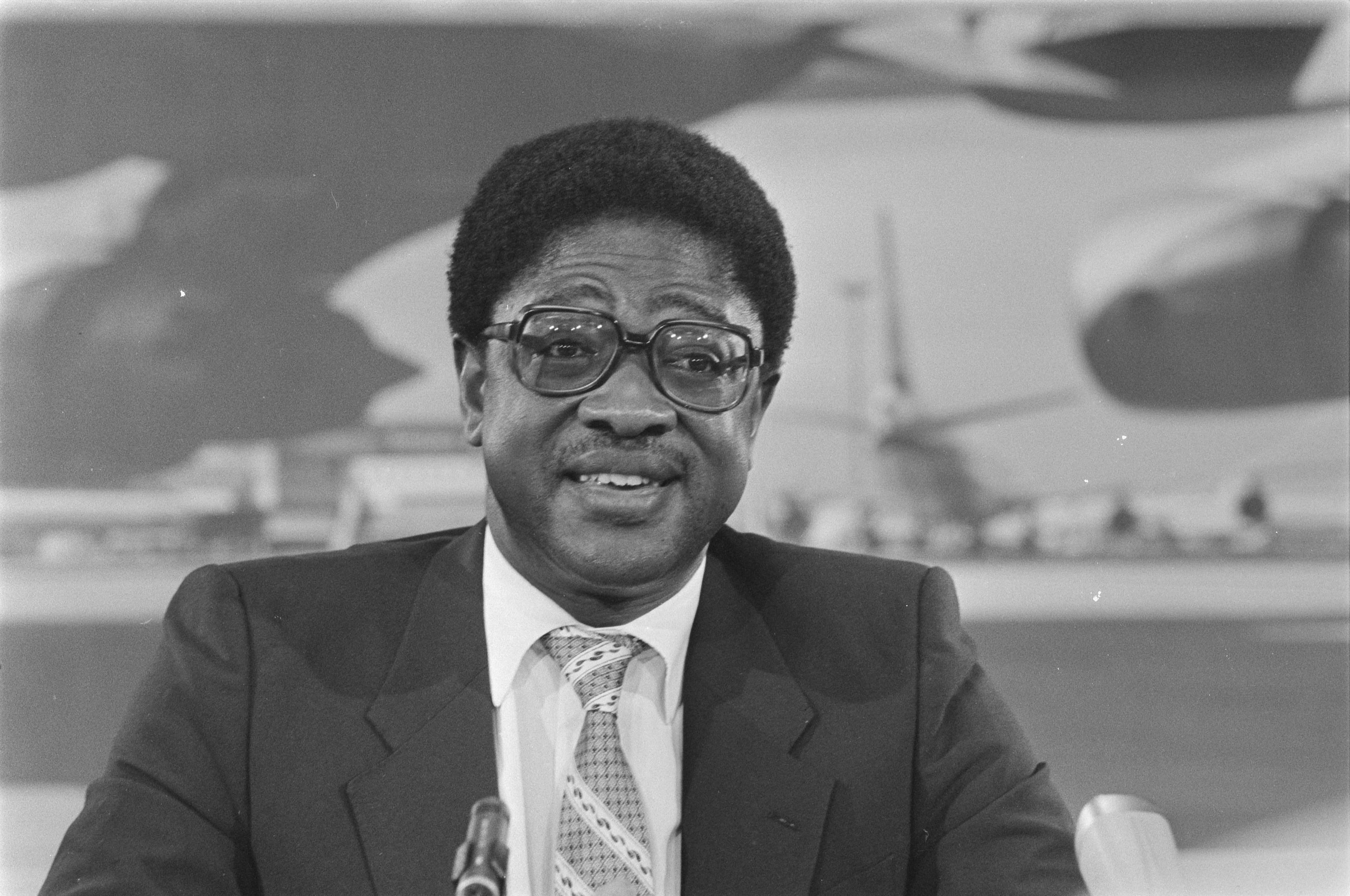 Collectie / Archief : Fotocollectie Anefo Reportage / Serie : [ onbekend ] Beschrijving : Persconferentie VN-rapporteur Amos Wako op Schiphol in verband met onderzoek dood 15 tegenstanders Bouterse Datum : 31 juli 1984 Locatie : Noord-Holland, Schiphol Trefwoorden : persconferenties Persoonsnaam : Amos Wako Fotograaf : Croes, Rob C. / Anefo Auteursrechthebbende : Nationaal Archief Materiaalsoort : Negatief (zwart/wit) Nummer archiefinventaris : bekijk toegang 2.24.01.05 Bestanddeelnummer : 933-0439